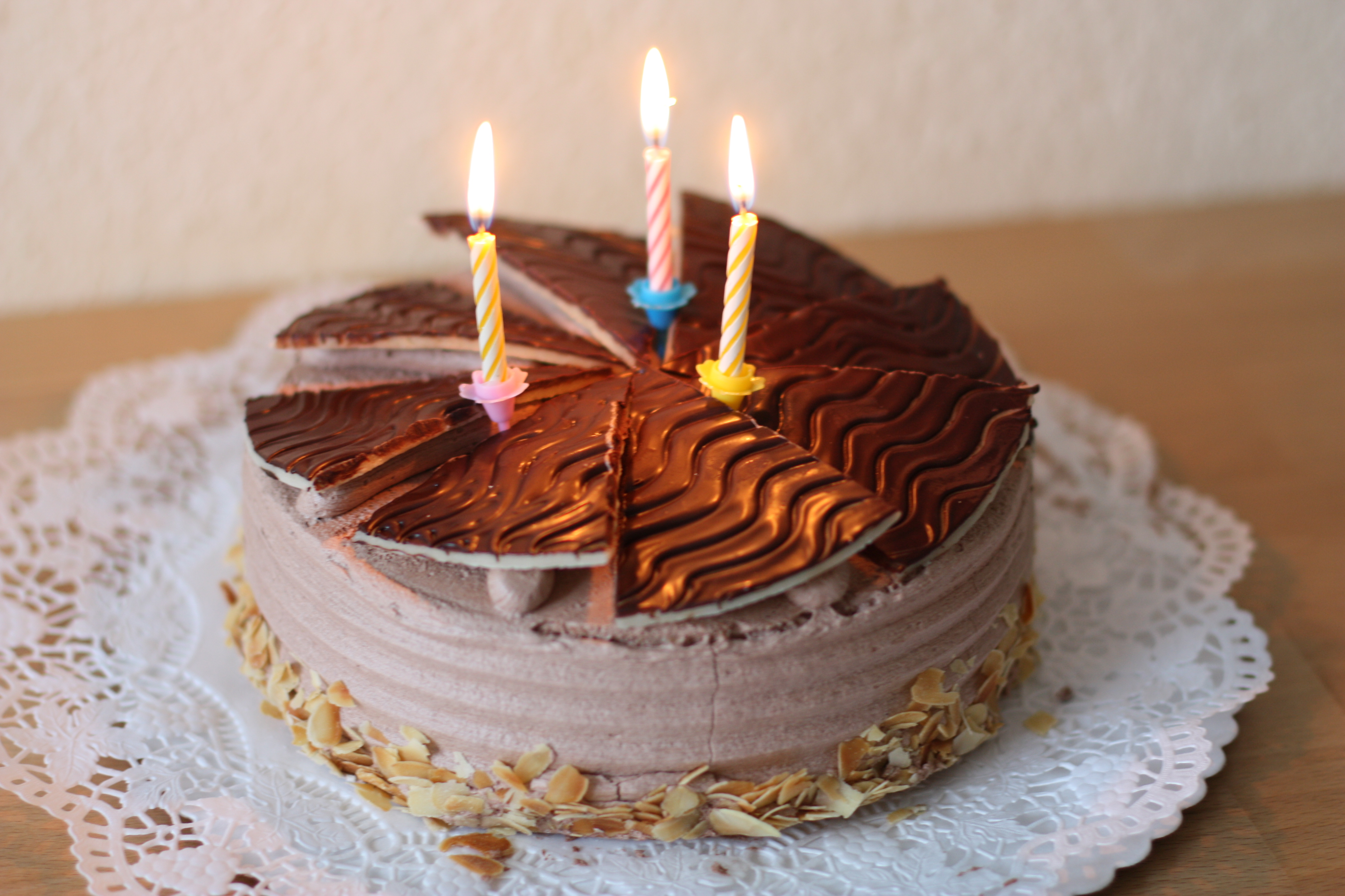 Schokoladentorte, Buttercreme, Tulpen ,dritter Geburtstag, drei Kerzen